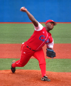 Yadier Pedroso